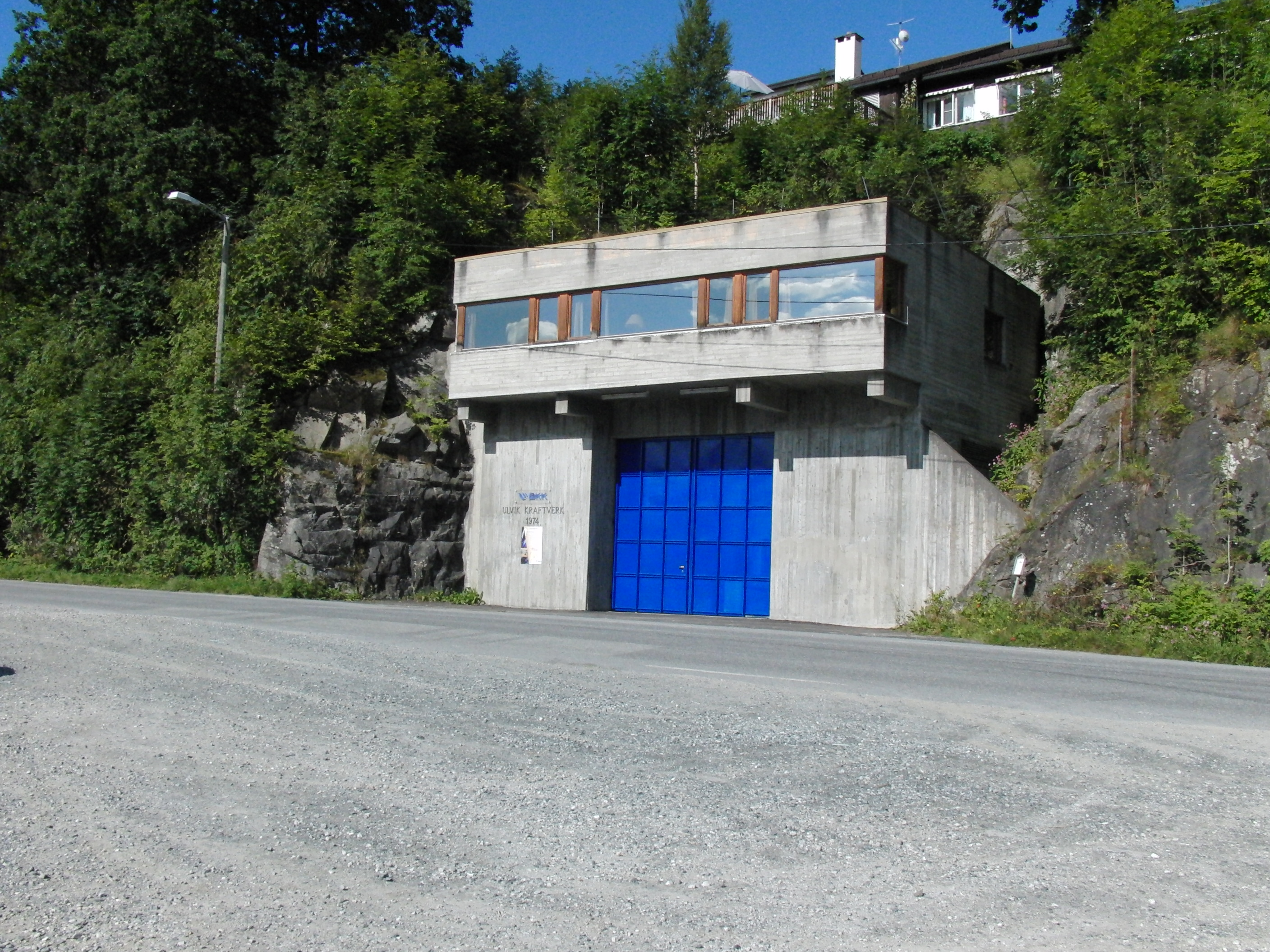 Ulvik kraftverk